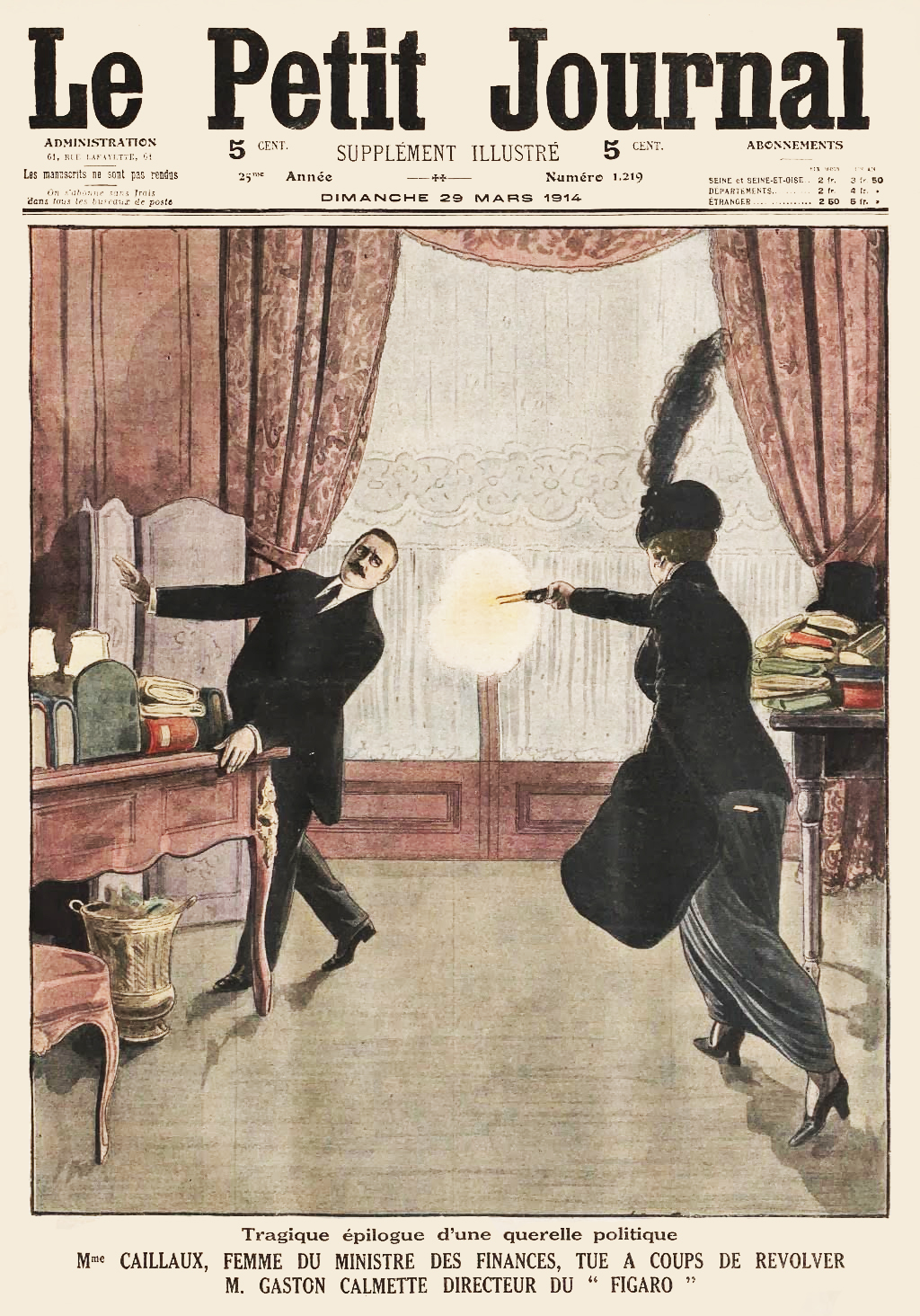 Cover of "Le Petit Journal" illustrating the assassination of Gaston Calmette, journalist and director of "Le Figaro", by Henriette Caillaux, wife of French Minister of Finance Joseph Caillaux. Caption: "Tragique épilogue d'une querelle politique. Mme Caillaux, femme du ministre des finances, tue à coups de revolver M. Gaston Calmette, directeur du Figaro."